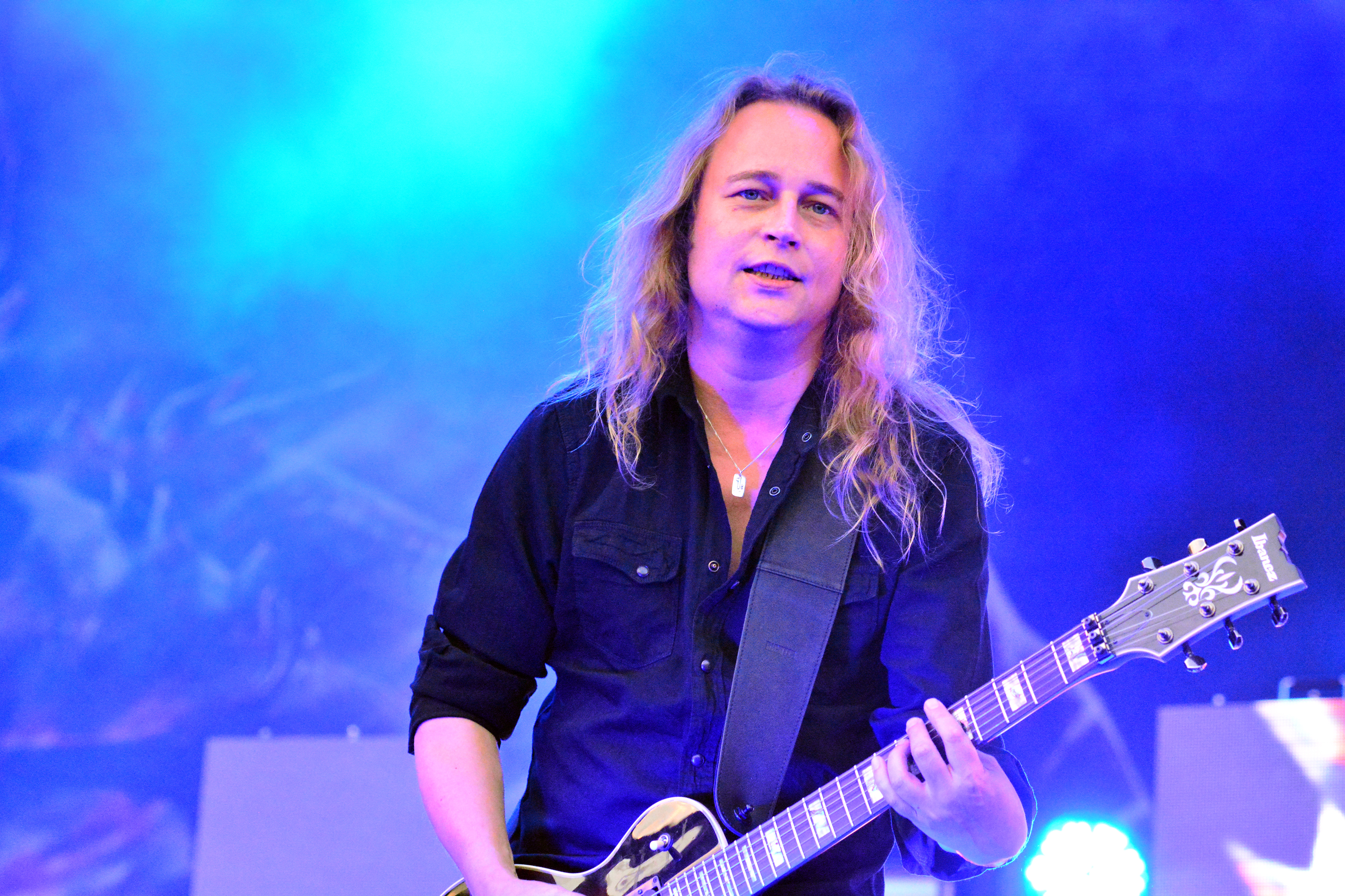 Kreator beim Elbriot 2015